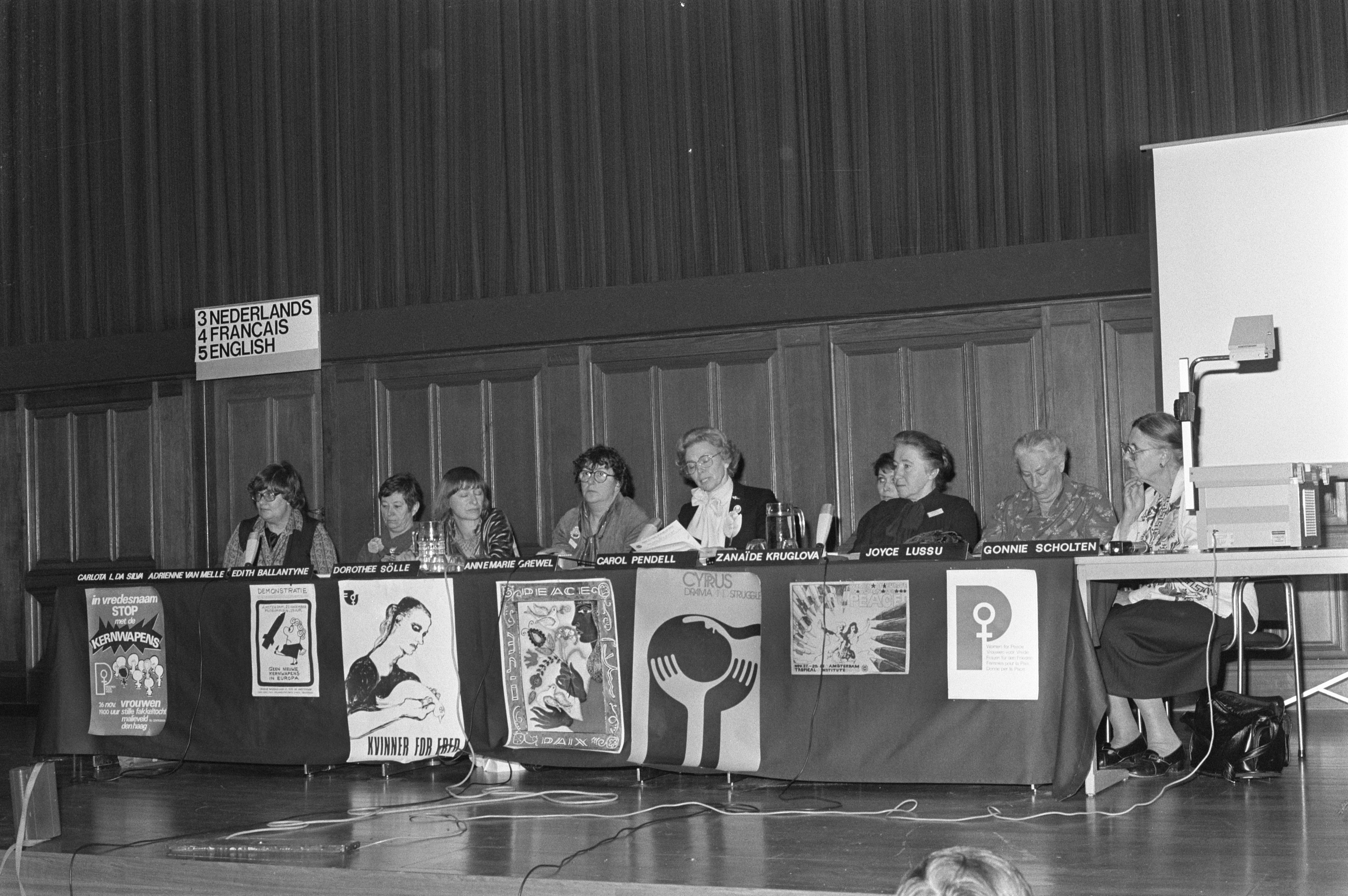 Collectie / Archief : Fotocollectie Anefo Reportage / Serie : Internationale Vrouwenvredesconferentie in het Tropenmuseum Beschrijving : Van links naar rechts Edith Ballantyne, Dorothee Sölle (Duitsland), Annemarie Grewel (Nederland), Carol Pendell (USA) internationaal voorzitter WILPF, Zanaide Kruglova (USSR) Datum : 27 november 1981 Locatie : Amsterdam, Noord-Holland Trefwoorden : conferenties, vrede, vrouwen Persoonsnaam : Ballantyne, Edith, Grewel, Annemarie, Kruglova, Zanaide, Pendell, Carol, Sölle, Dorothee Instellingsnaam : Tropenmuseum Fotograaf : [onbekend] Auteursrechthebbende : Nationaal Archief Materiaalsoort : Negatief (zwart/wit) Nummer archiefinventaris : bekijk toegang 2.24.01.05 Bestanddeelnummer : 931-8309